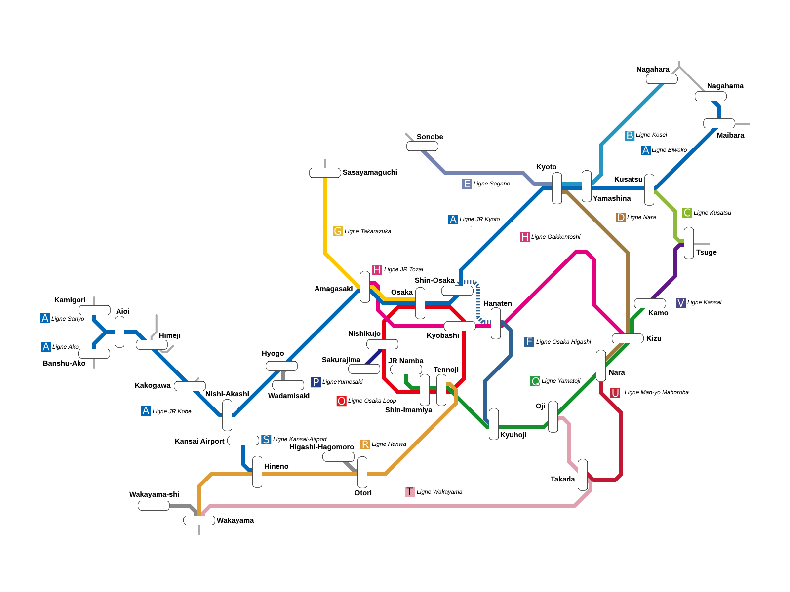 Carte du Reseau urbain du Keihanshin